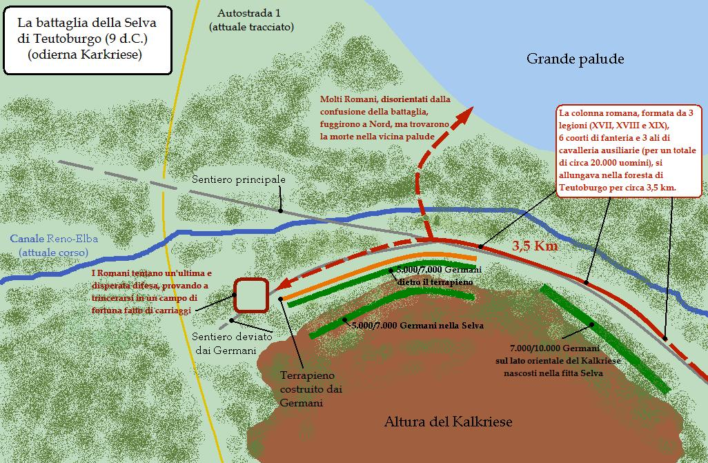 La battaglia della selva di Teutoburgo (9 d.C., giustificativo mancare)